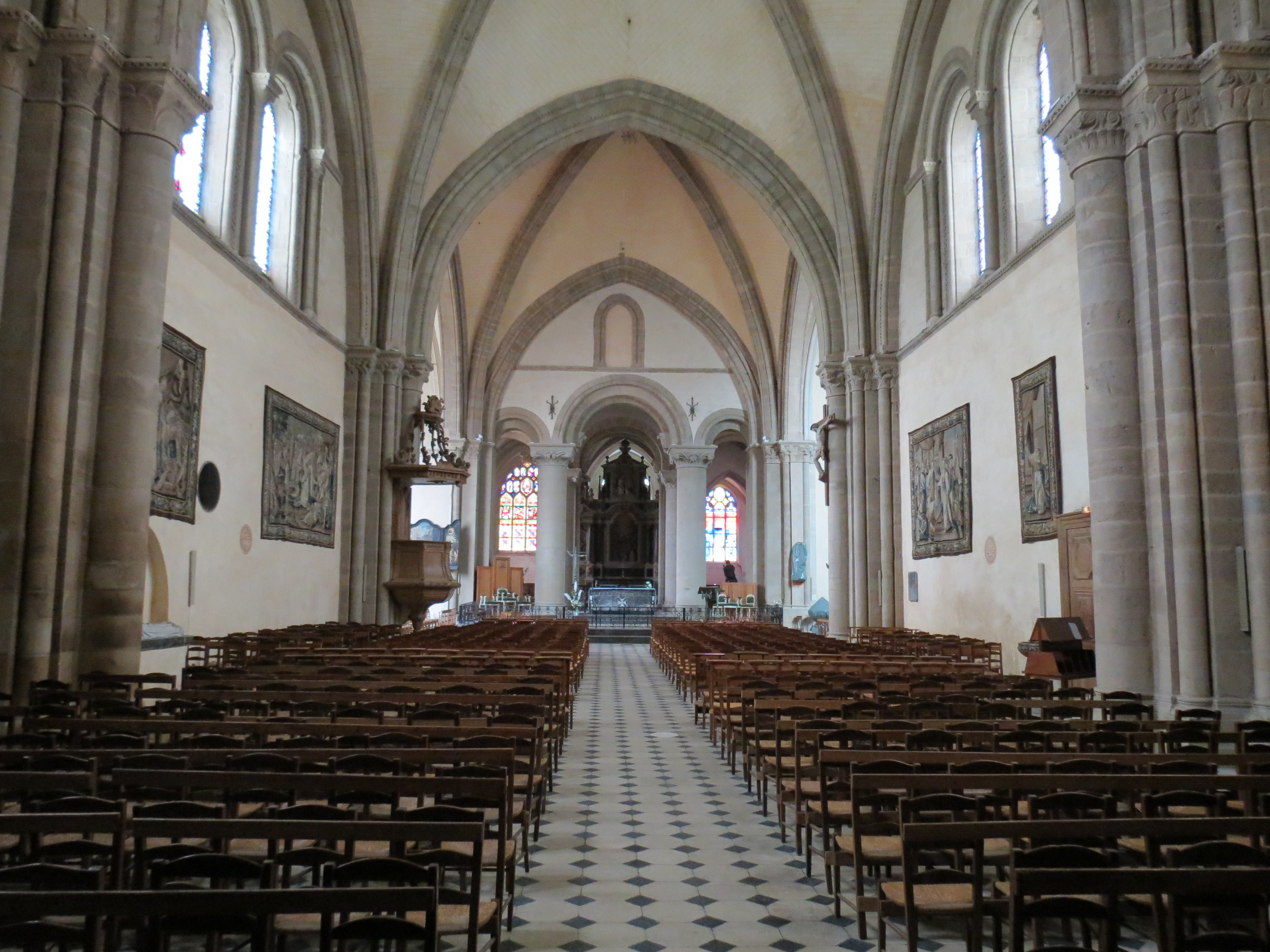 Nef de la cathédrale de la Sainte-Trinité de Laval, Mayenne, Pays de la Loire.